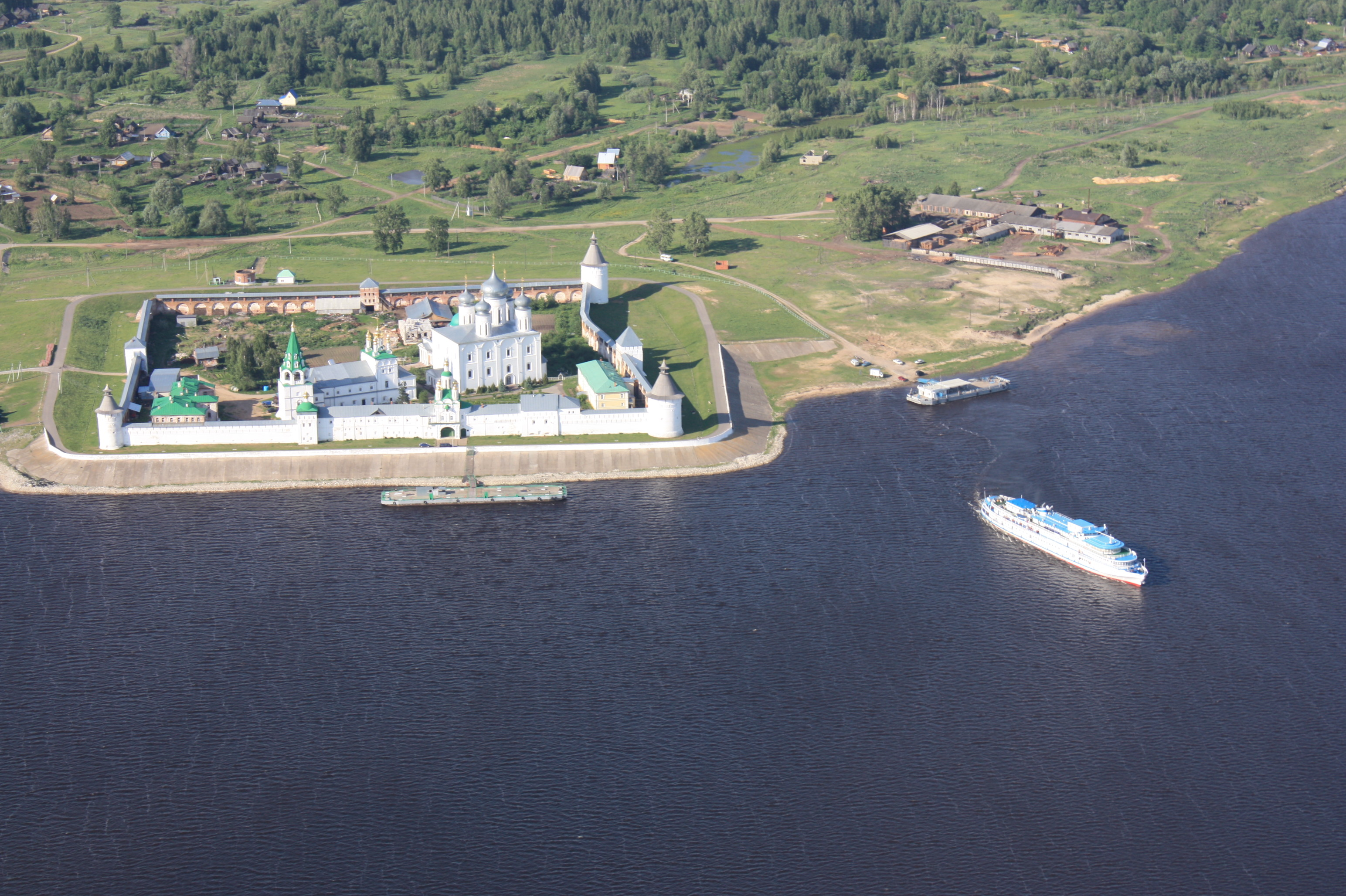 Свято-Троице-Макарьево-Желтоводский_монастырь